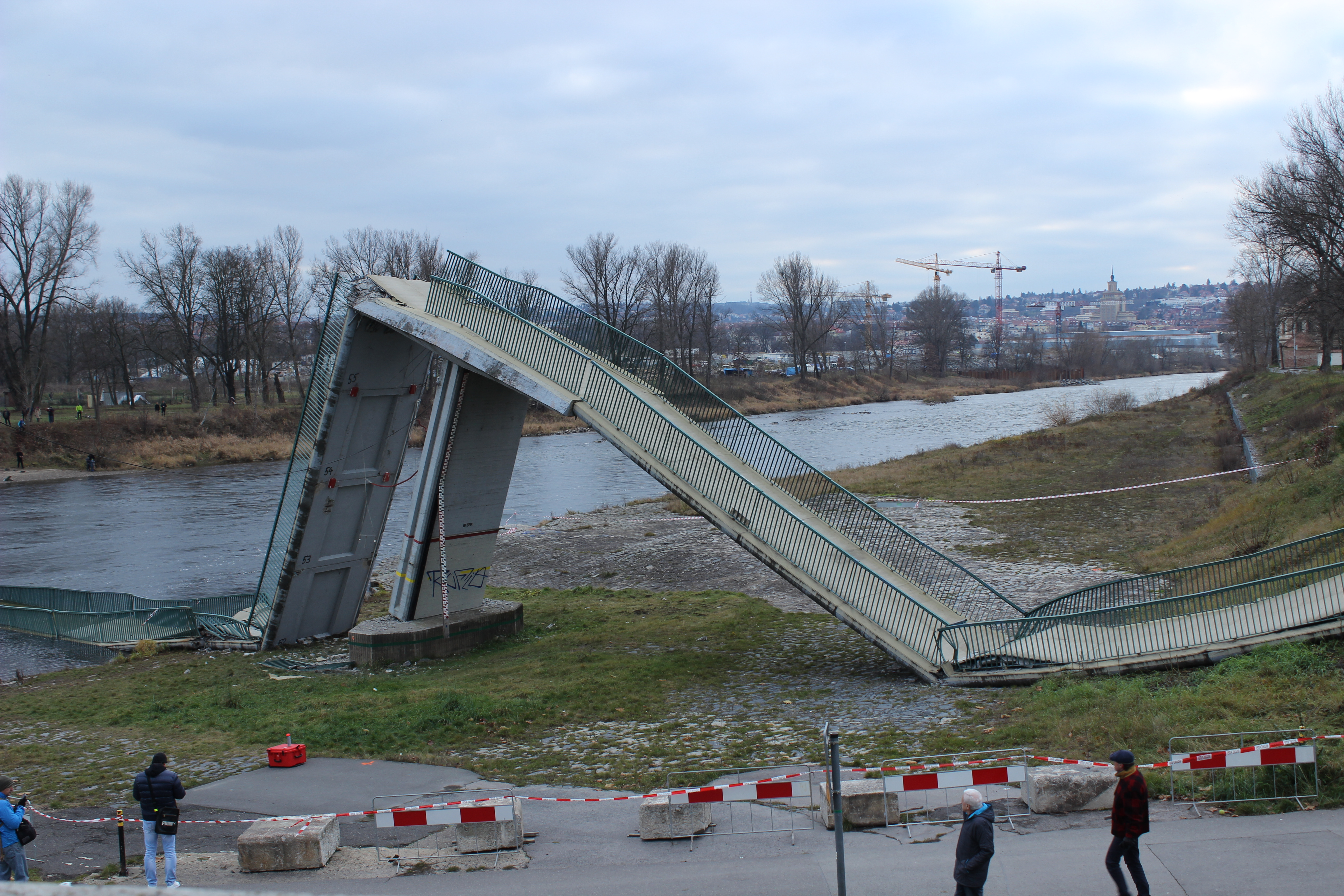 Zřícená Trojská lávka zachycená den následující po neštěsí, tedy 3. prosince 2017.